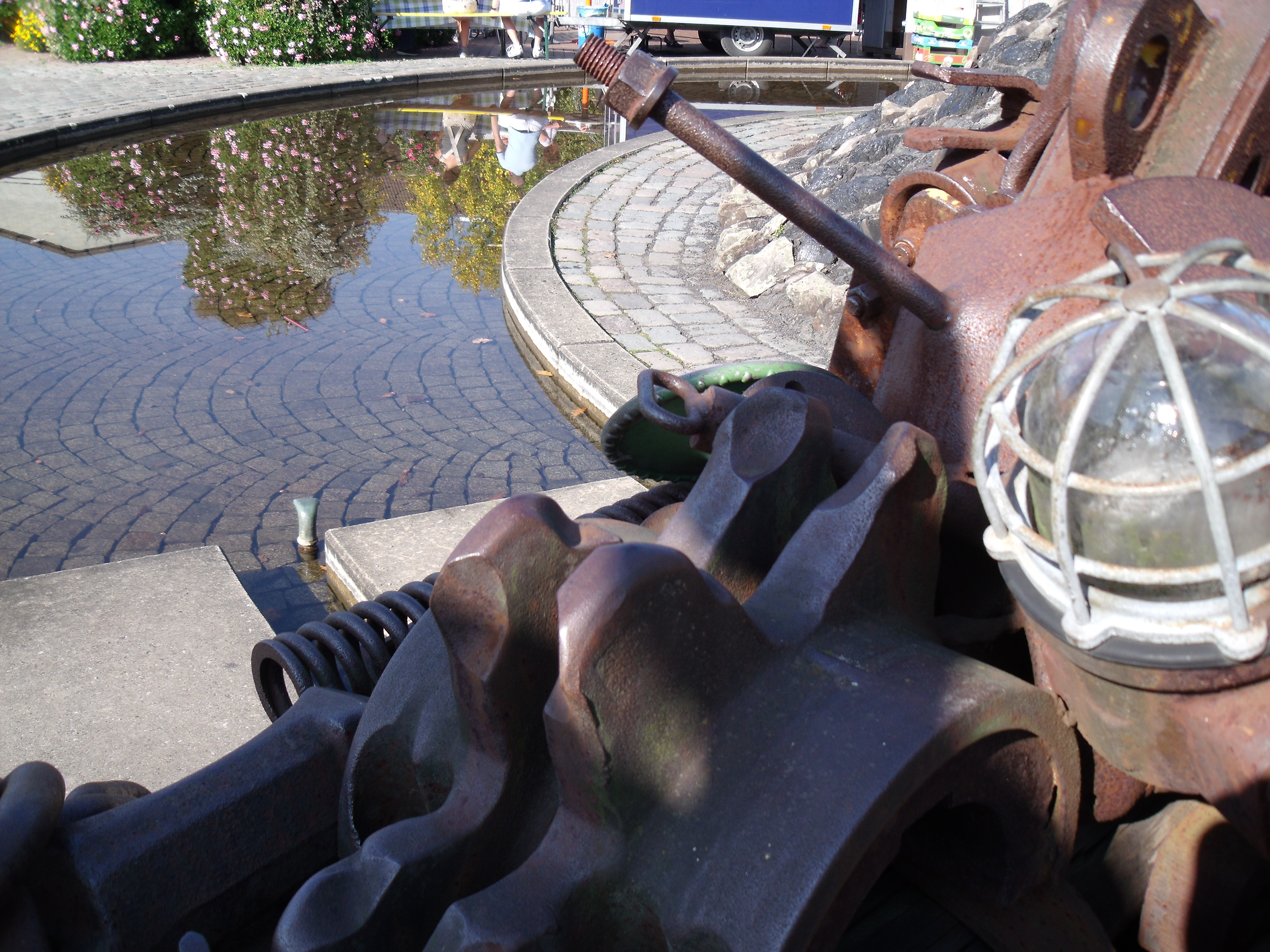 Ausgebauter Kettenstern mit Panzerkette auf einem Flachwagen liegend